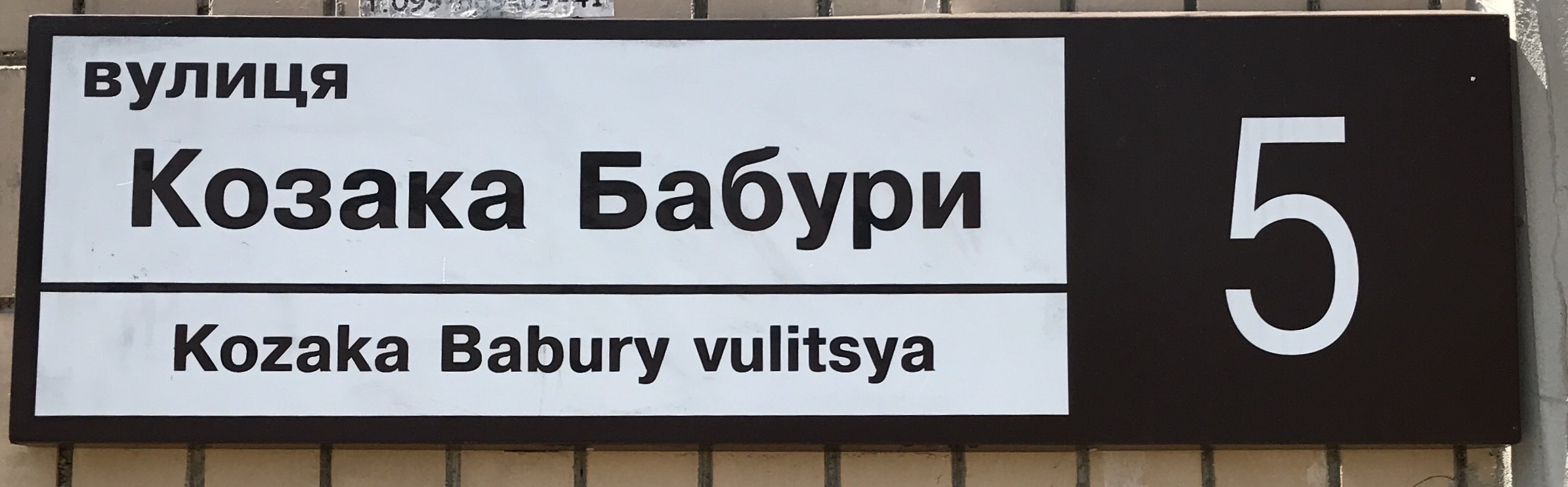 Нові вказівники на вулиці Козака Бабури, липень 2017